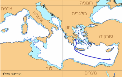 מסלול ההפלגה